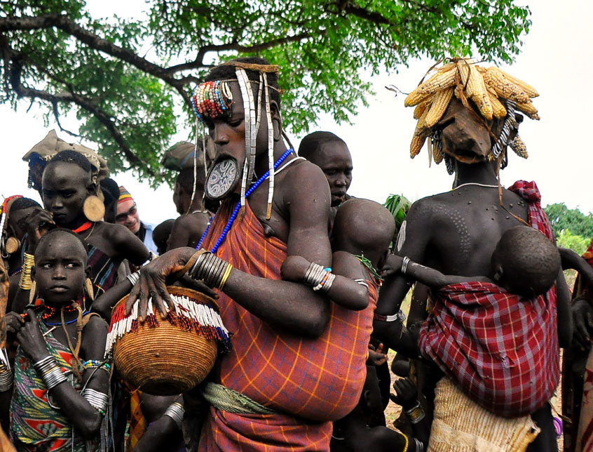 Mursi Tribe